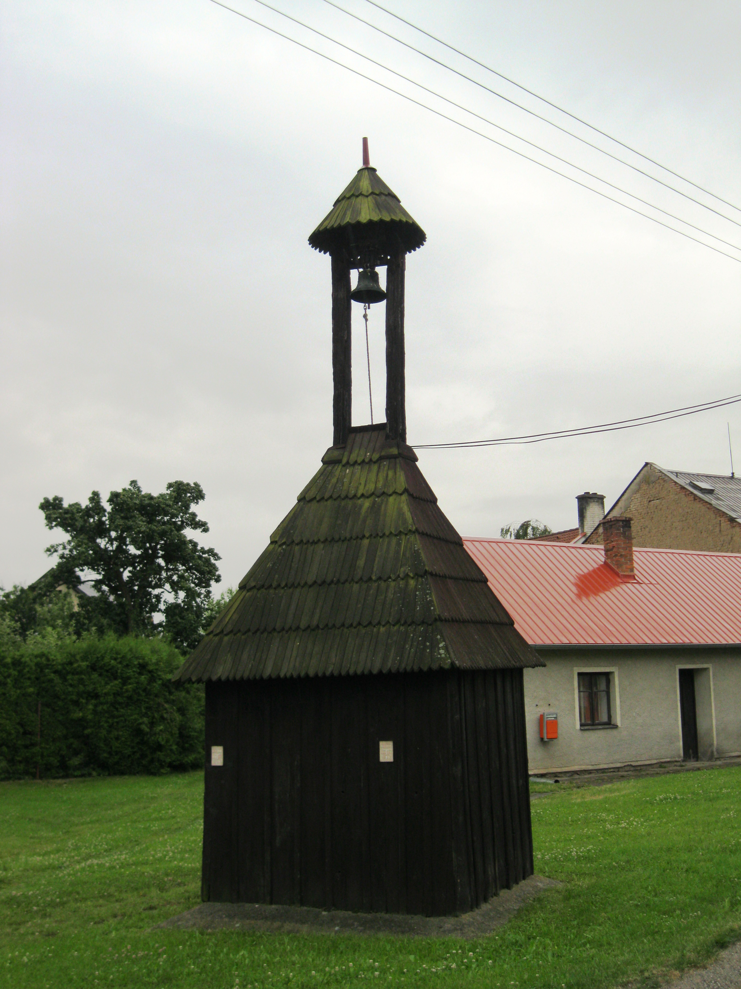 Zvonička (Lhota nad Moravou), náves, Lhota nad Moravou